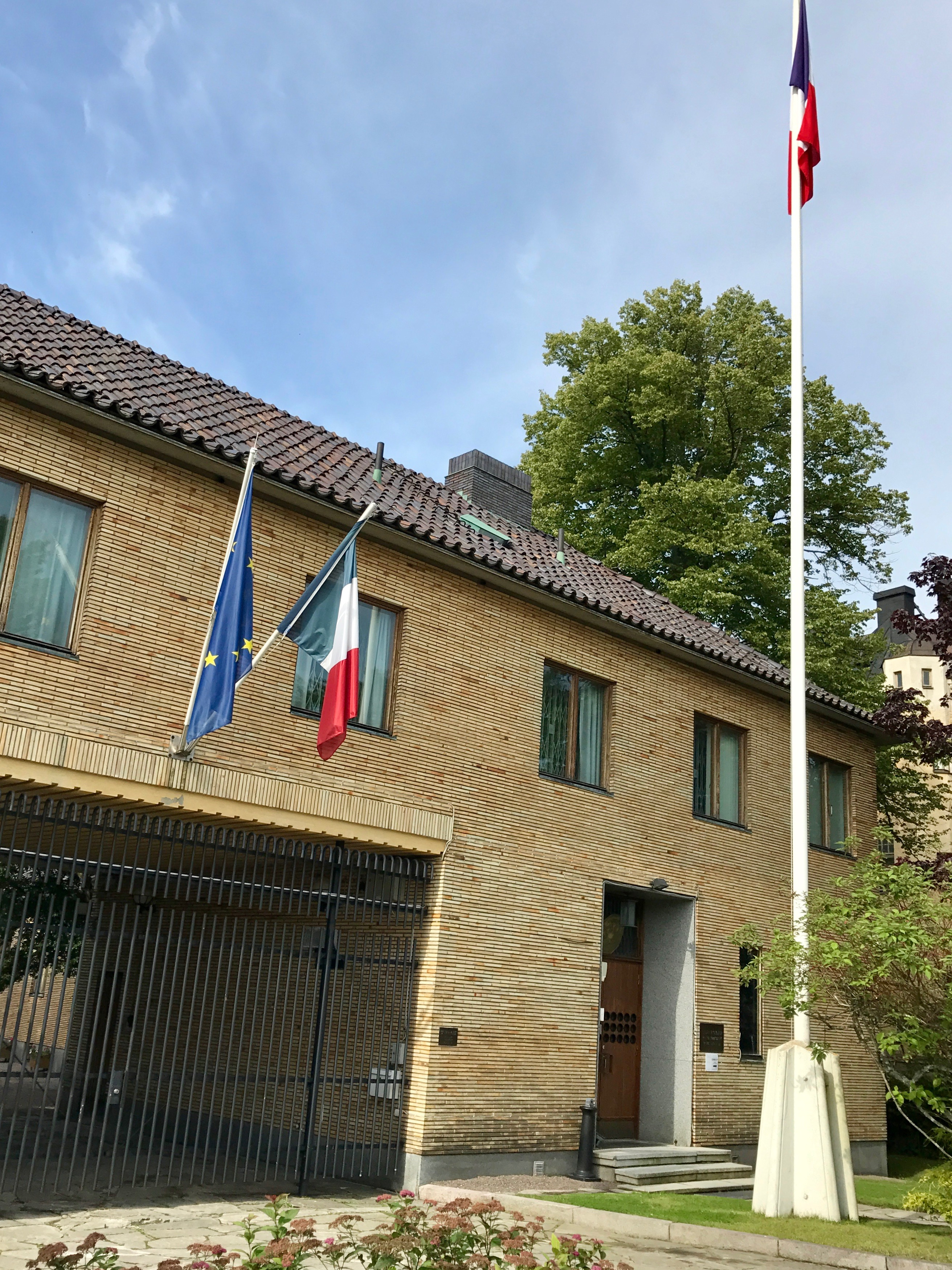 Ranskan Helsingin-suurlähetystö Kaivopuistossa osoitteessa Itäinen Puistotie 13.